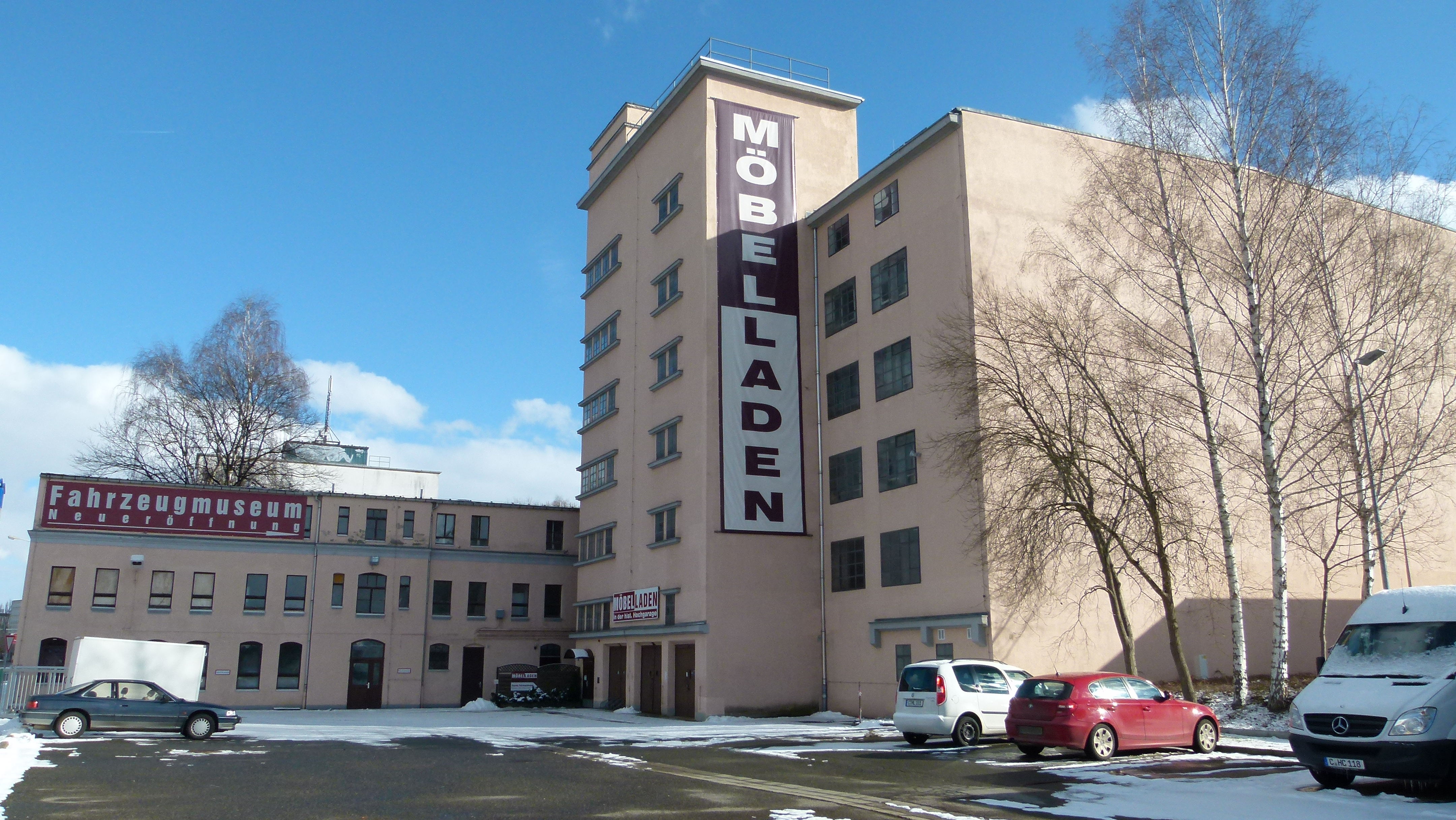 Denkmalgeschützter Garagenhof in Chemnitz, Zwickauer Straße 77, Fahrzeugmuseum